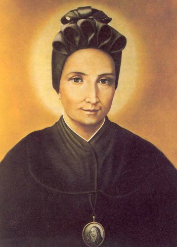 Santa Magdalena Gabriela de Canossa Fundadora